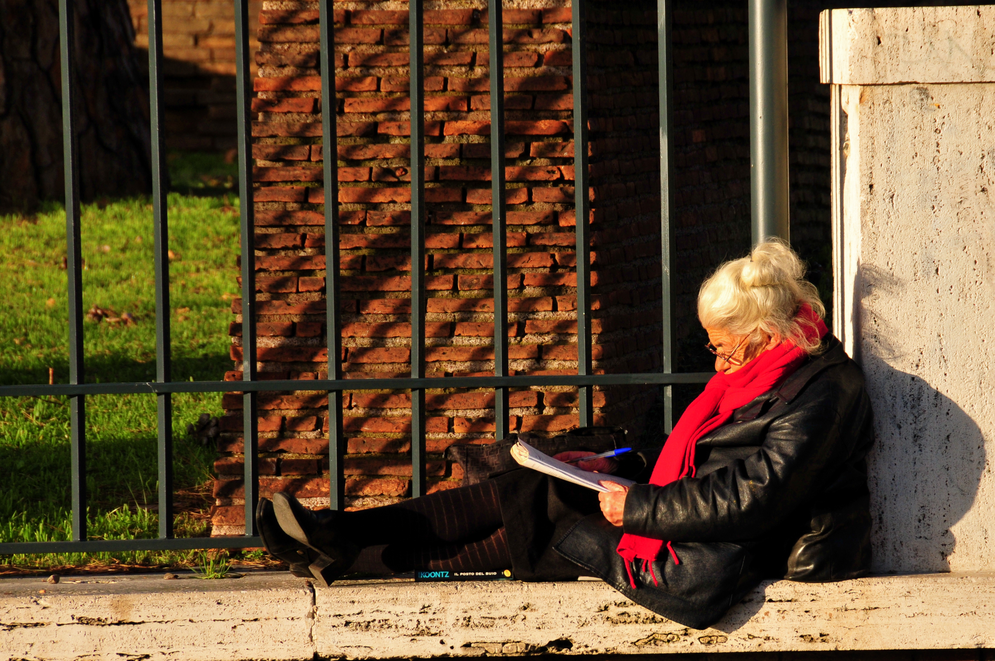 Rome